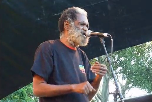 Junior Byles auf dem Garance Reggae Festival in Bagnols-sur-Cèze in Frankreich 2010